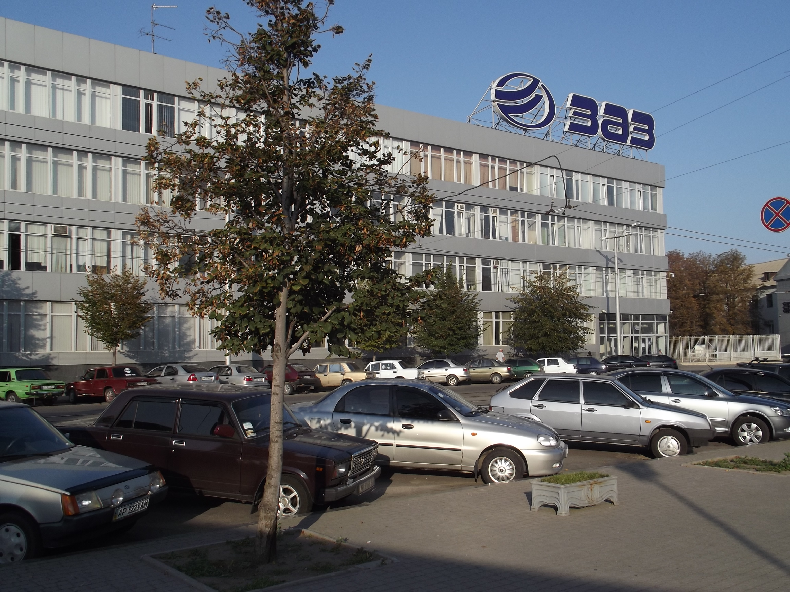 Завод ЗАЗ